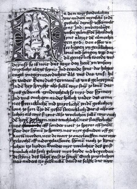 Niederrheinische Handschrift der Gertrud von Büchel (Kloster Nonnenwerth): Ordinarius et Caerimoniae ordinis s. Benedicti de observantia Bursfeldensi, 1497 (Staatsbibliothek zu Berlin - Preußischer Kulturbesitz, Ms. Germ. 4° 555, Bl. 8r)